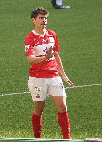 Alex Raphael Meschini